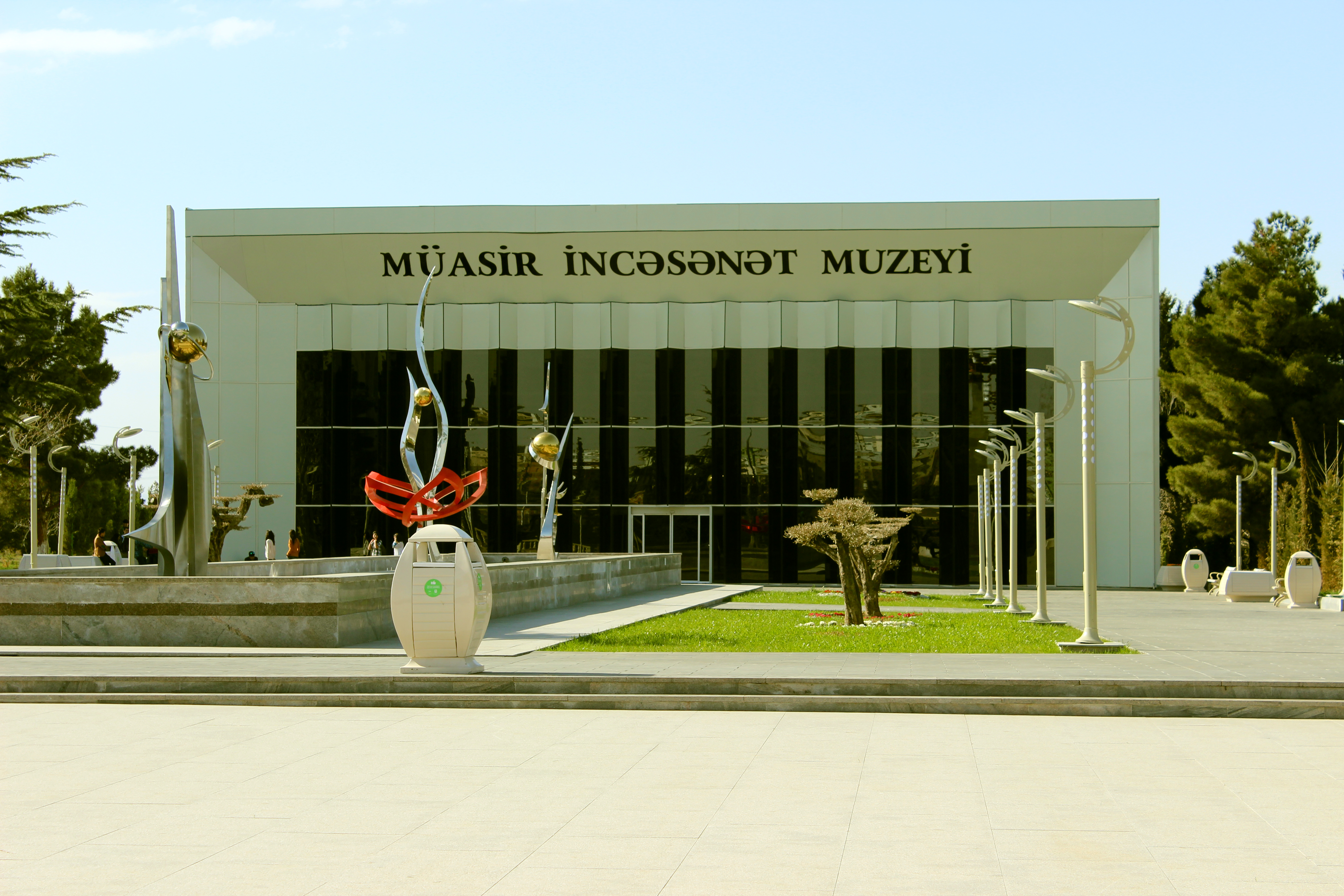 Gəncə Müasir Sənət Muzeyi